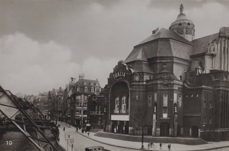 Originale Beschreibung: „Das Thalia-Theater war von 1906 bis 1967 ein Unterhaltungstheater im Zentrum des heutigen Wuppertaler Stadtteils Elberfeld. Im Thalia-Theater wurden zwischen 1924 und 1926 auch Sendungen der Westdeutschen Funkstunde produziert, bevor der Sender als Westdeutscher Rundfunk nach Köln umzog.“